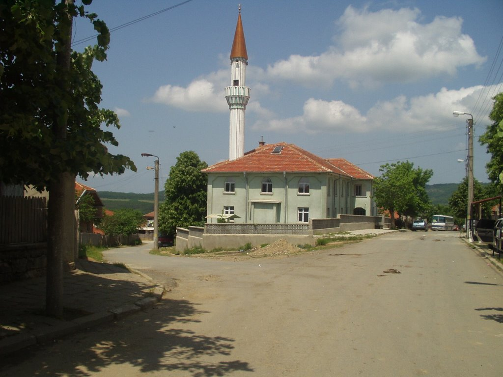 Topçuköy camii